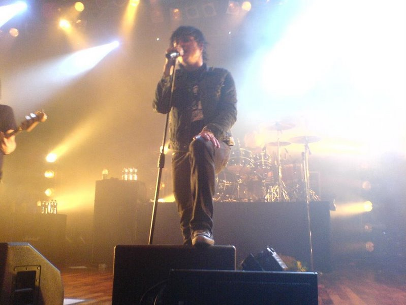 Gerard Way en un concierto de My Chemical Romance en Brasil, en febrero de 2008.